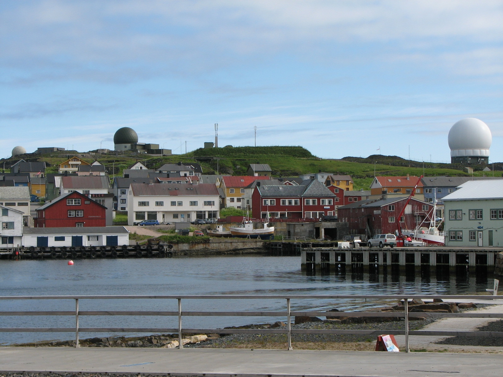 Vardø sommeren 2008.